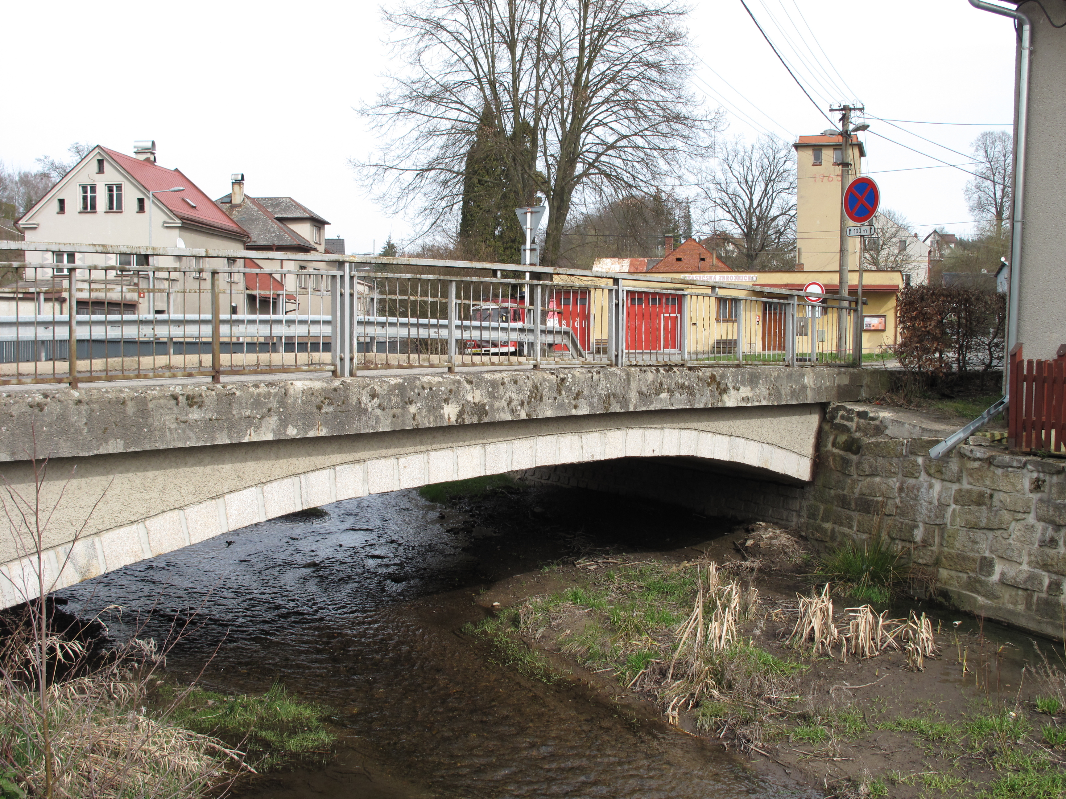 Český Dub III. Okres Liberec, Česká republika. Most Masarykovy ulice přes potok Rašovka.